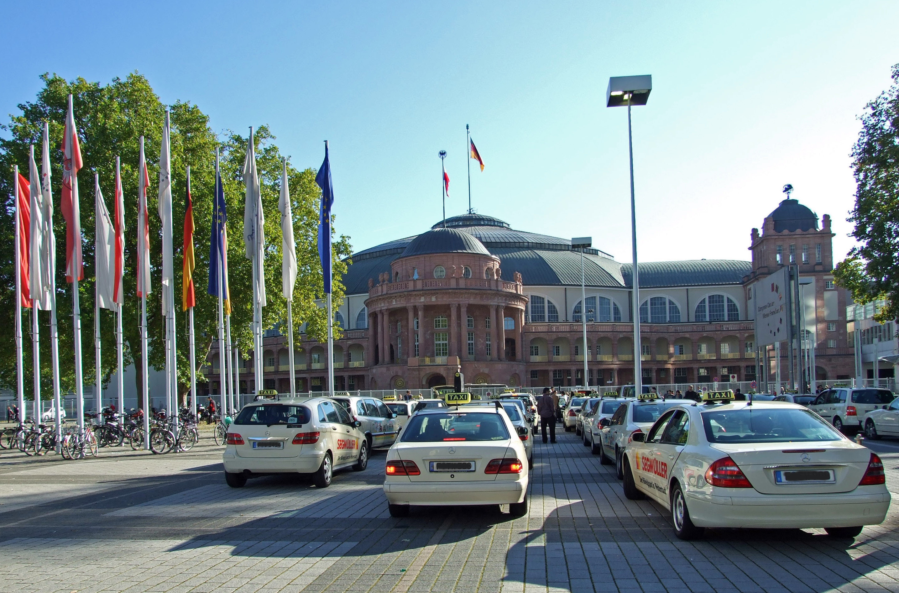 Die Festhalle auf dem Messegelände in Ffm